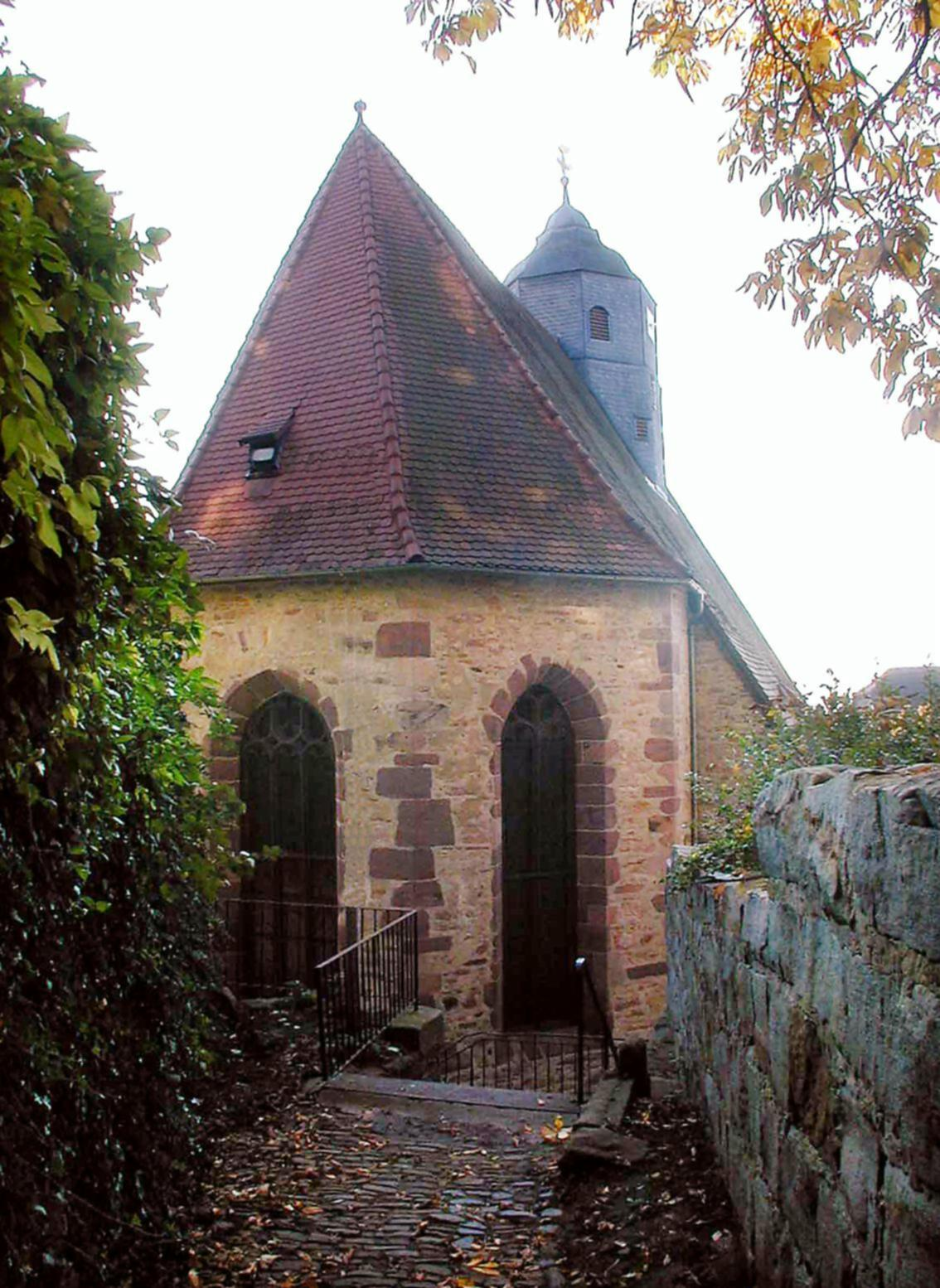 Blick auf die Stephanskirche von Südwesten (unterhalb des sog. Hexenturms)